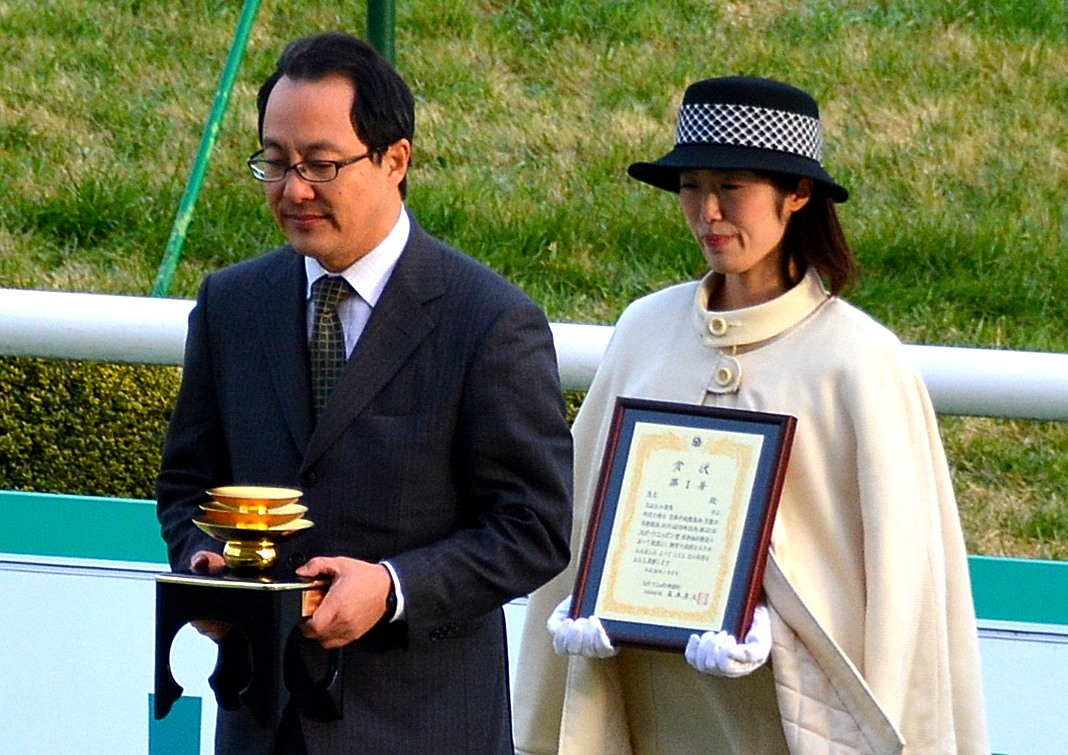 2014年1月5日に京都競馬場の第11競走で行われた、第52回スポーツニッポン賞京都金杯(GIII)の表彰式で、勝利馬エキストラエンドの馬主である社台レースホース代表者に対してJRAから贈られた金杯を、観客席であるグランドスワンから撮影したもの。